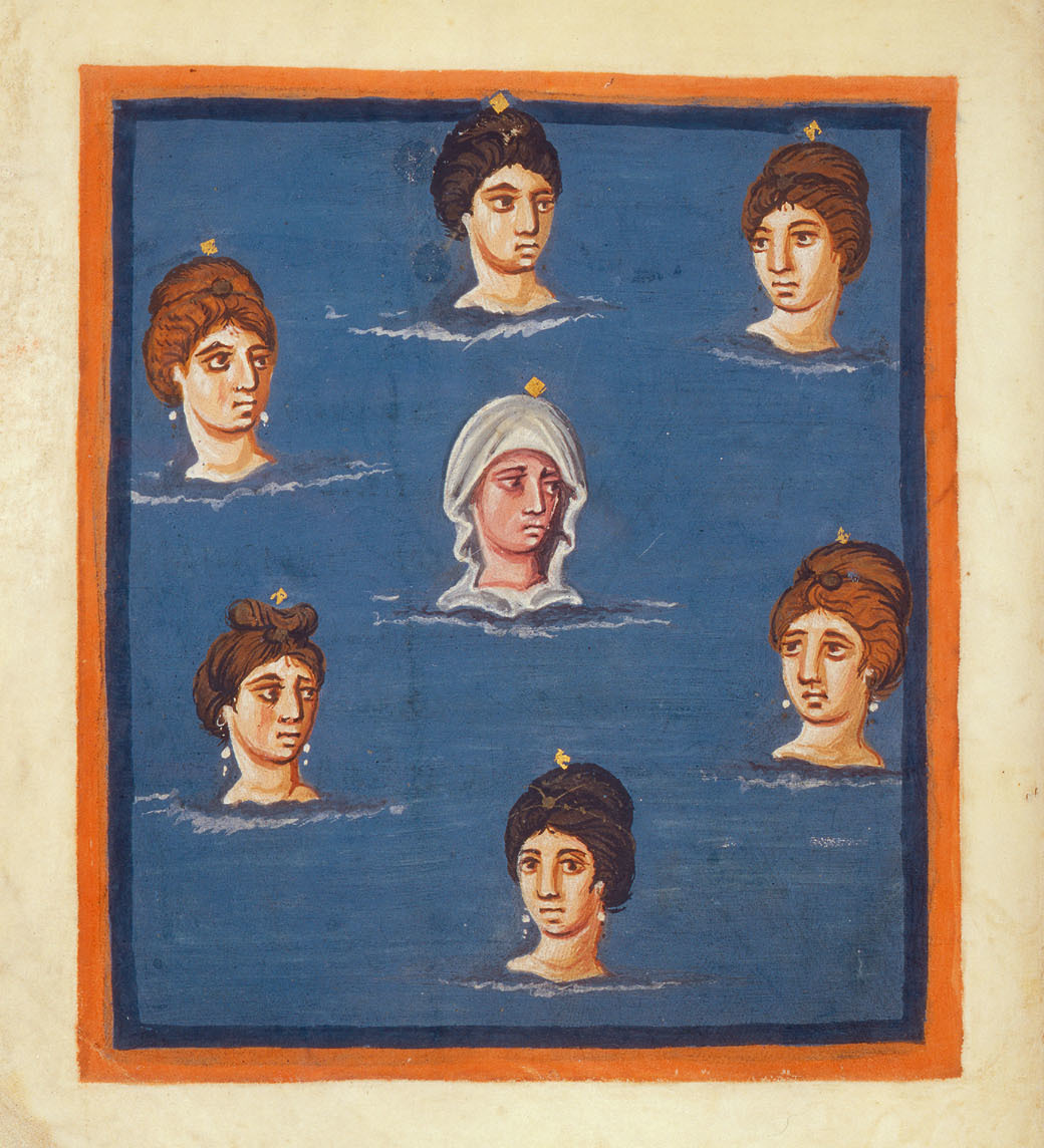 Fol. 42v Pleiades